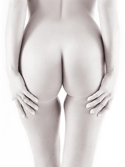 Beschreibung, Quelle ; Bildbeschreibung: High Key Aktfoto ; Quelle: "selbst fotografiert" ; Fotograf/Zeichner: Titus36